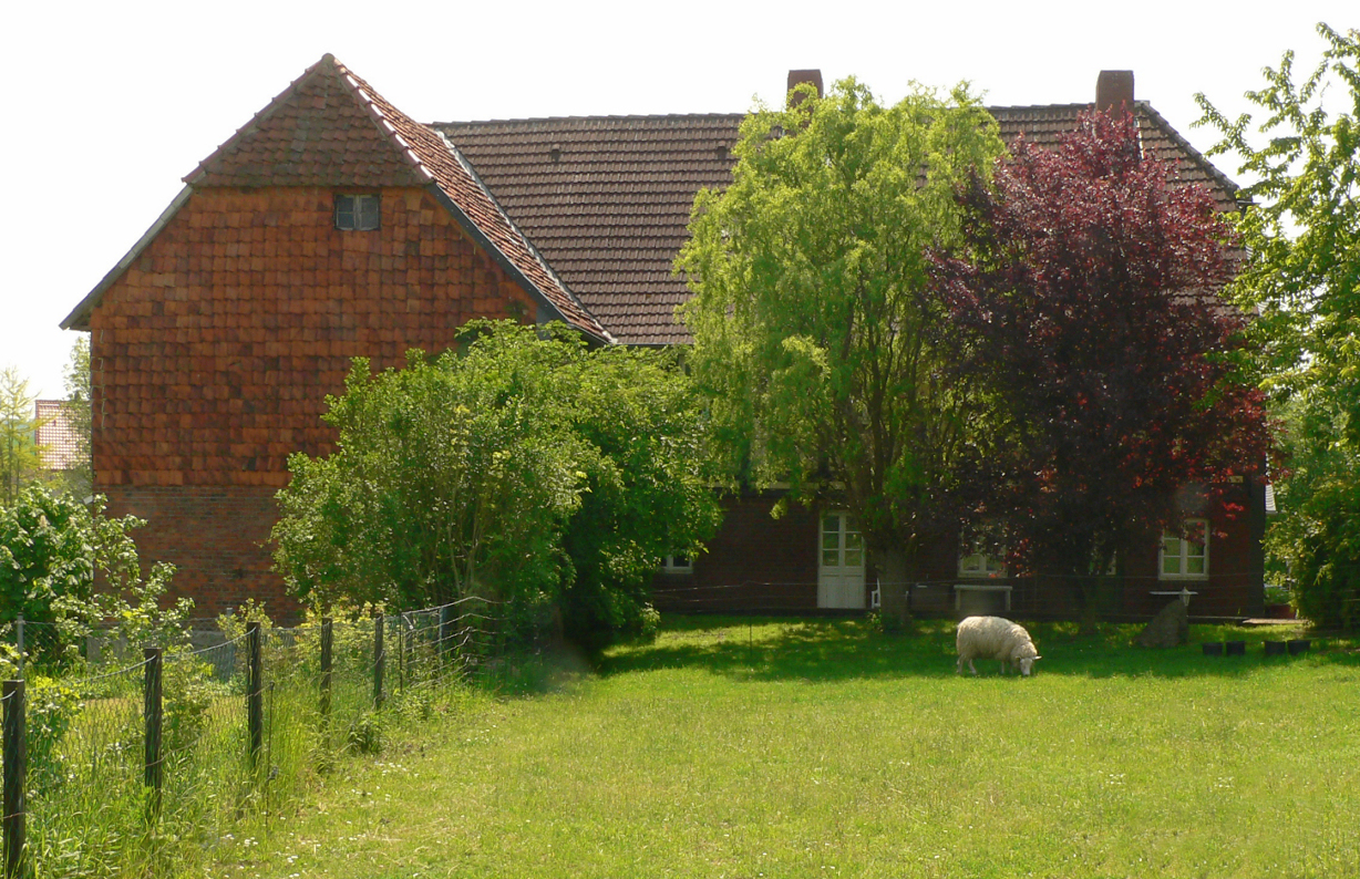 Mühle Prinzhorn, Rückseite am Mühlengraben